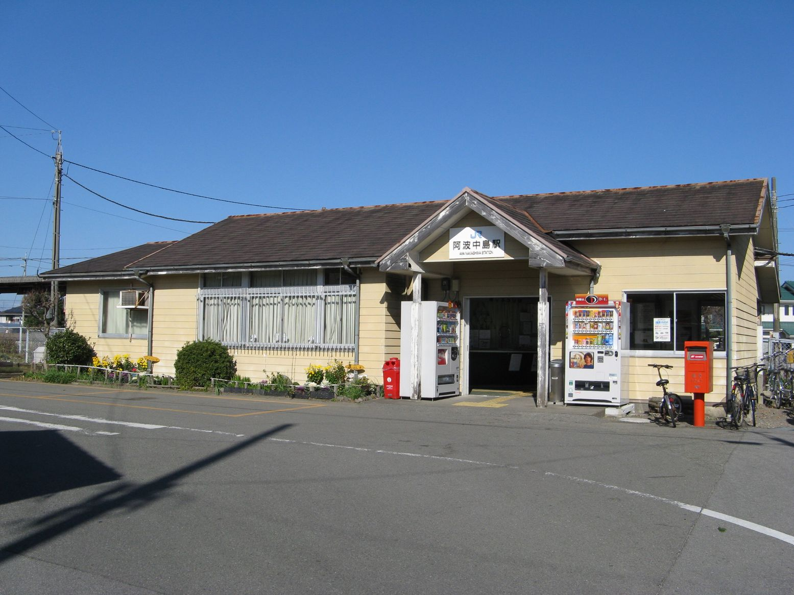 牟岐線阿波中島駅 駅舎